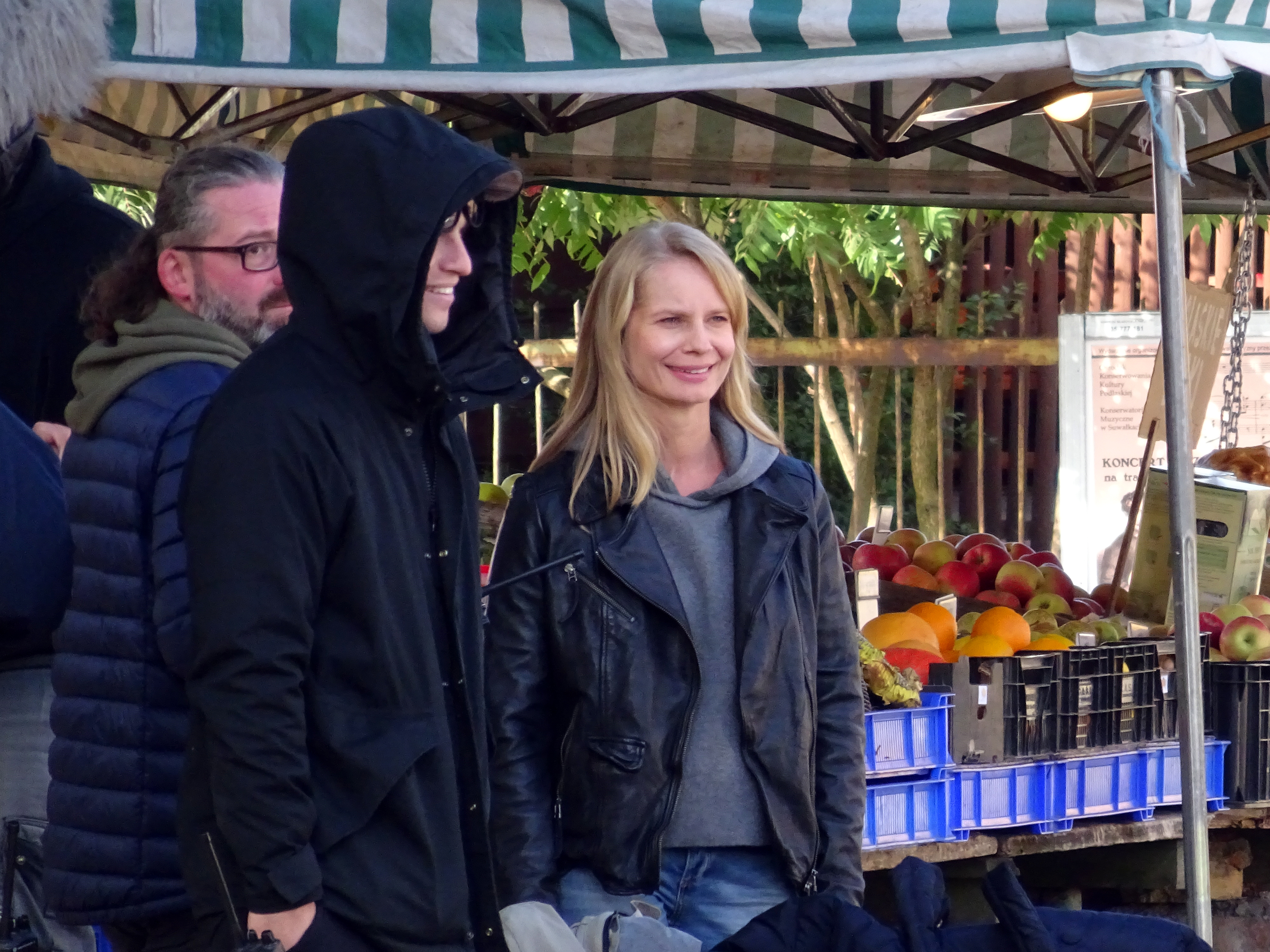 Reżyser Marek Wróbel i aktorka Magdalena Cielecka na planie serialu Chyłka w Kolnie.